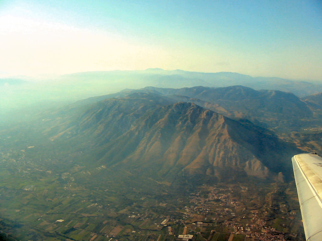 Il Monte Taburno visto dall'alto